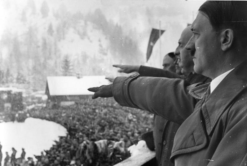 Eröffnung der IV. Winterolympiade. Der Führer und Baillet-Latour.